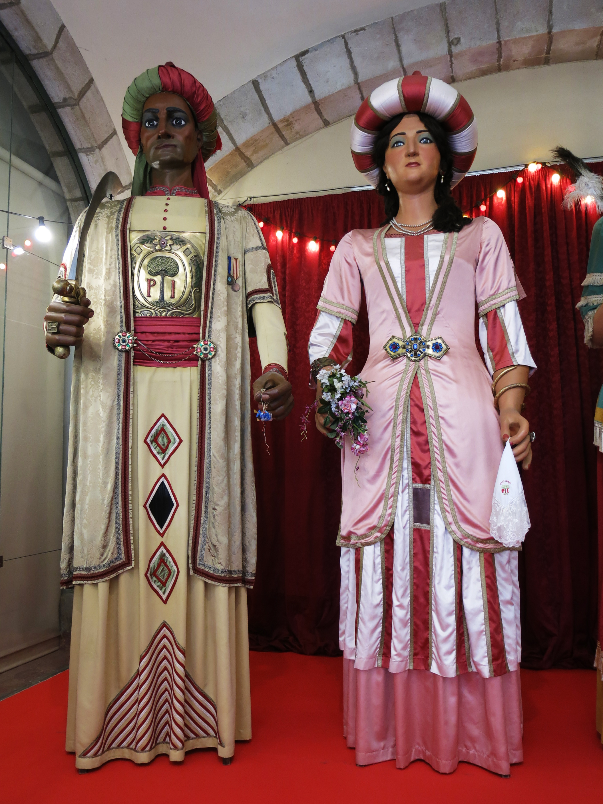 Gegants del Pi (Palau de la Virreina, Barcelona)